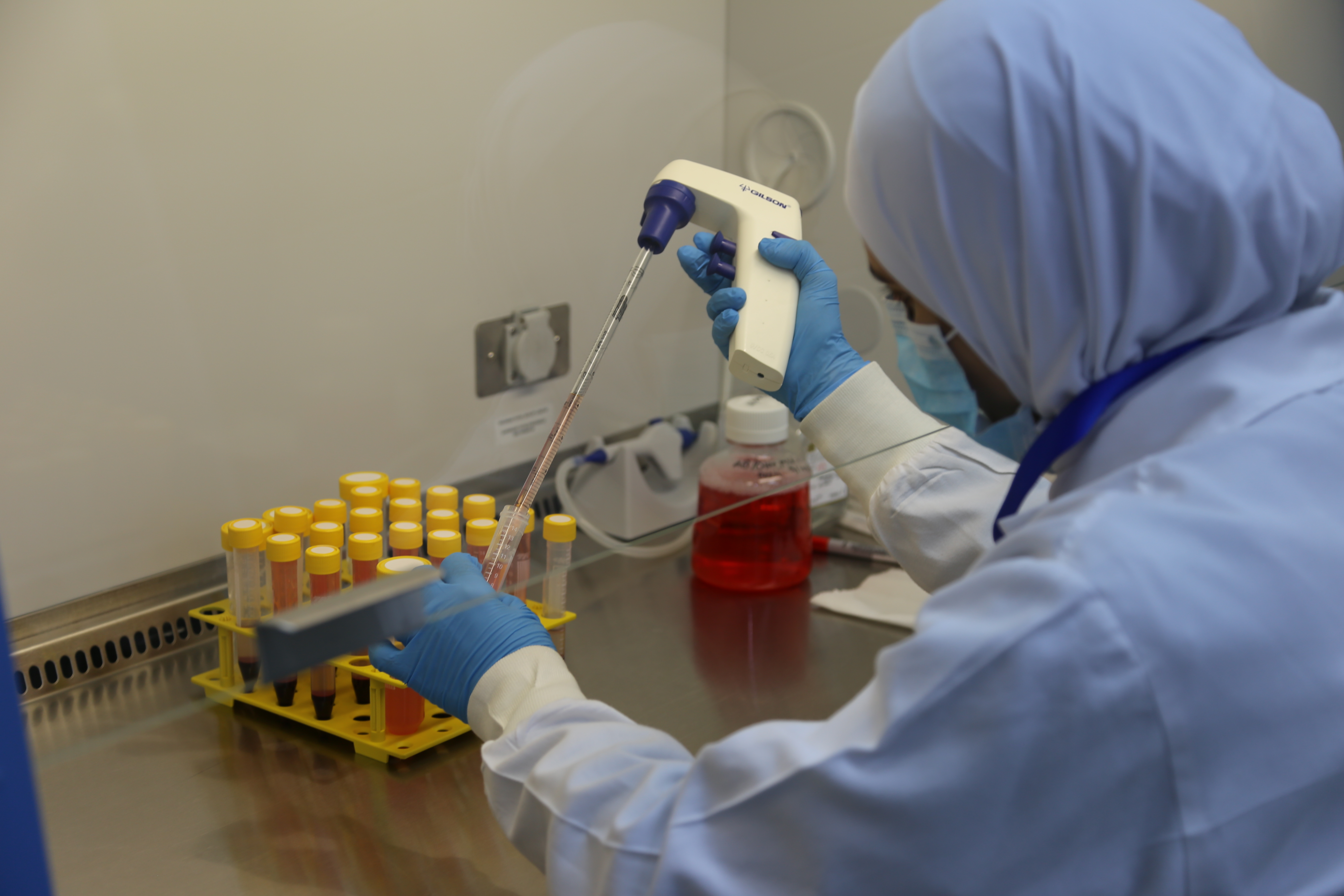 مركز الخلايا الجذعية في الجامعة الأردنية